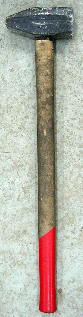 Suurvasar